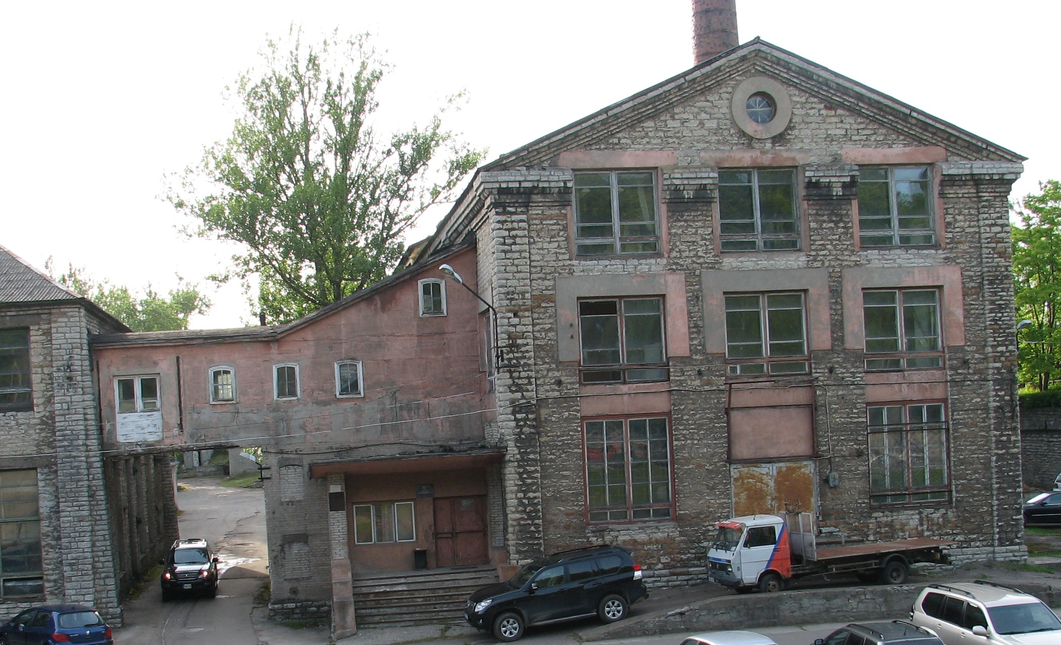 Noblessneri laevatehase elektrijaam koos korstnaga, 1914-1915